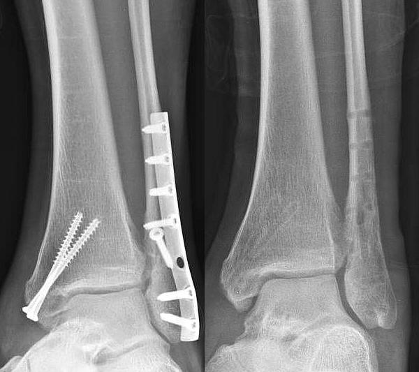 Positives Sklerogramm nach Paul